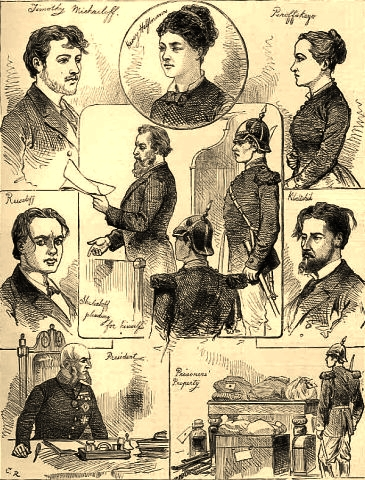 Pervomartovcy